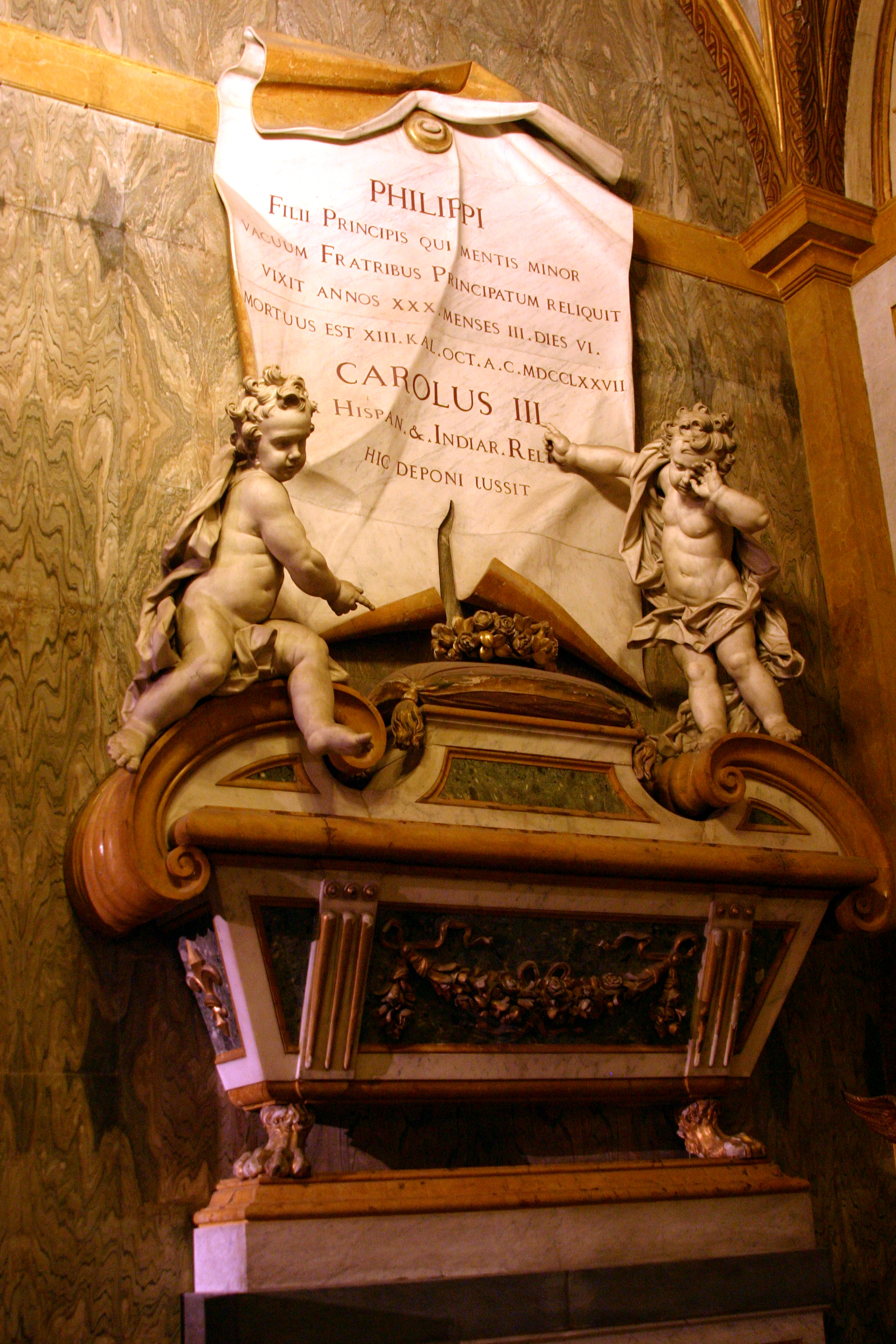 Santa Chiara - Naples